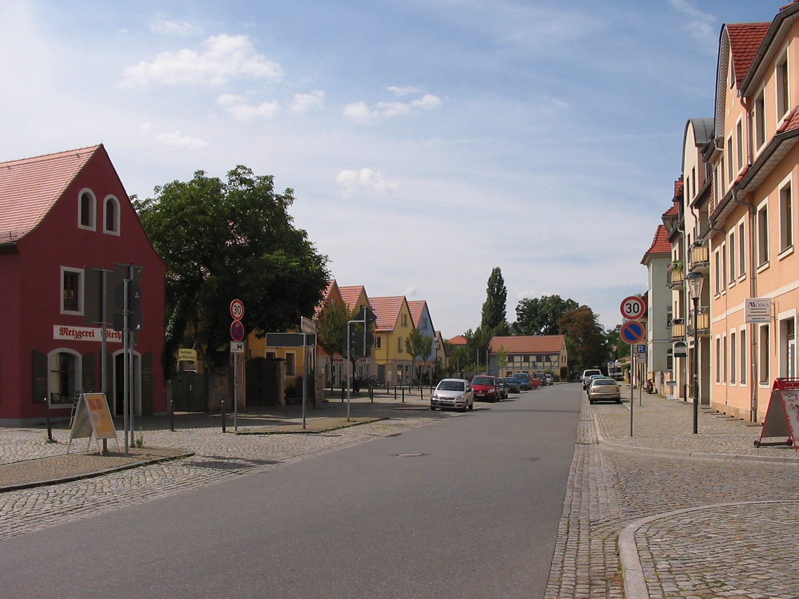 Kötzschenbroda, Unterdorf, im Hintergrund das Hirtenhaus